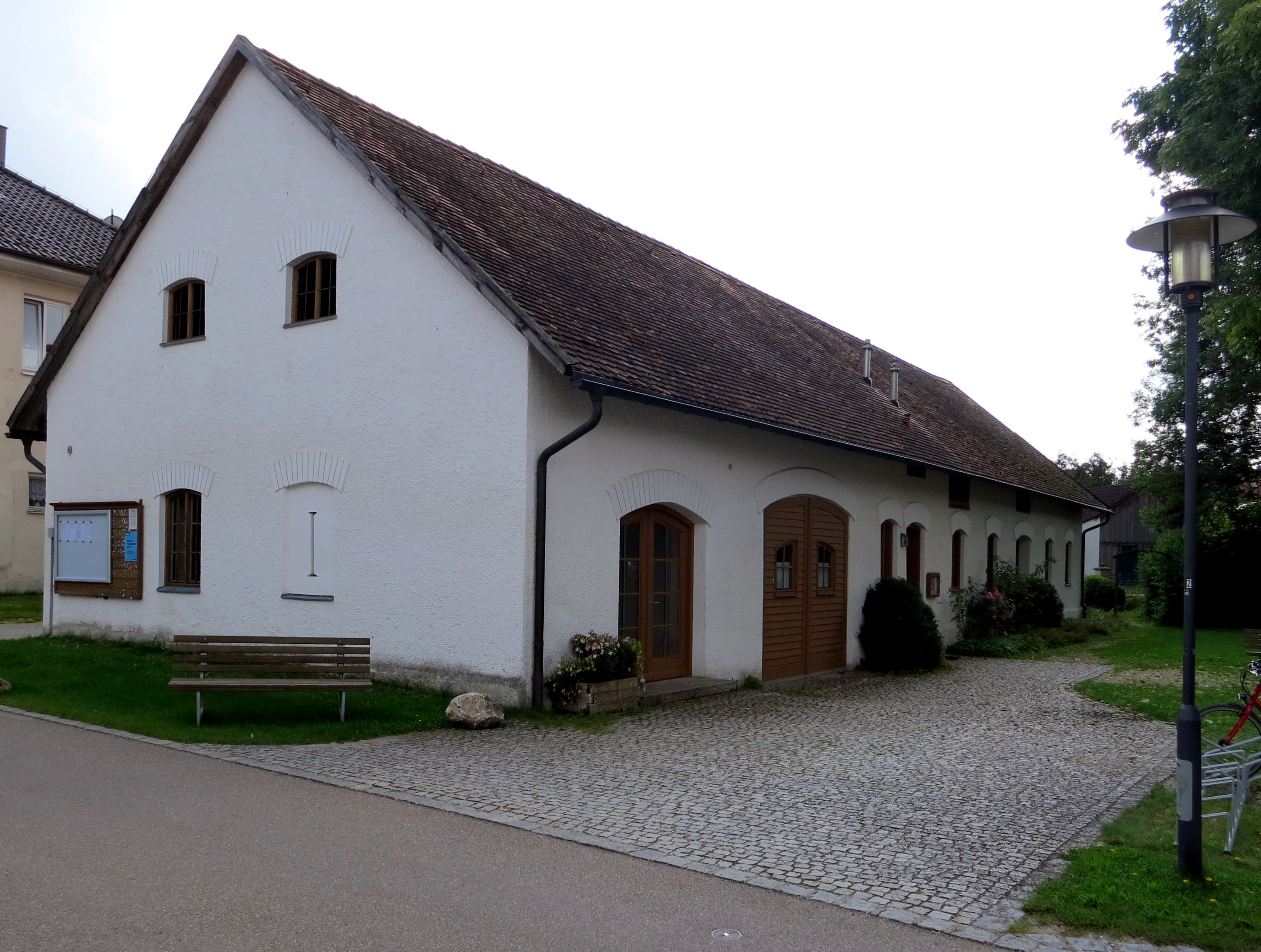 Pfarrhof in Pipinsried, drei Gebäude um gemeinsamen Hofraum angeordnet; ehemalige Remise, heute Pfarrsaal